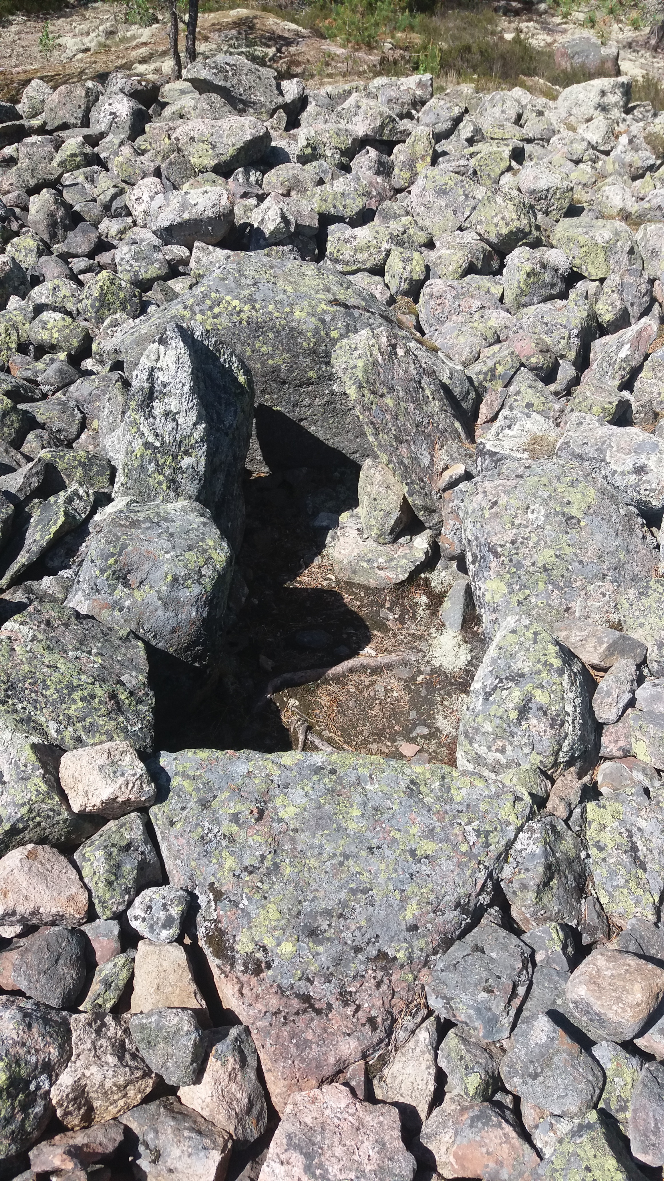 Bronsåldersgravrösena i Sammallahdenmäki hittas i byn Kivikylä i Raumo i Västra Finlands län i Finland. Sammallahdenmäki består av totalt 33 gravrösen från bronsåldern (i Finland 1500–500 f.Kr.), vid den tiden låg området vid kusten. Gravarna är gjorda i tre olika mönster, låga och runda smårösen, stora stackformade och runda ringformade rösen. En enda av gravarna är fyrkantig och kallas ”Kyrkgolvet” (finska: Kirkonlaattia). Fyrkantiga stenrösen är inte kända från andra delar av Finland och formen är ovanlig inom hela den skandinaviska bronskulturens område. Enligt folksägnen tävlade jättar med några kristna om vem som kunde bygga en kyrka fortast. De kristna jobbade snabbast, och det fyrkantiga röset är grunden till den kyrka som jättarna påbörjade. Bronsåldersgravrösena i Sammallahdenmäki skrevs in som Finlands första arkeologiska objekt på Unescos världsarvslista 1999.